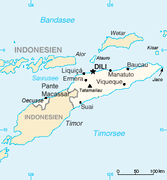 Karte von Osttimor, deutsche Sprachversion